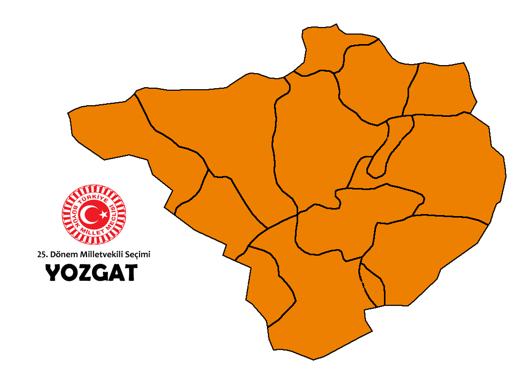 2015 genel seçim sonuçları